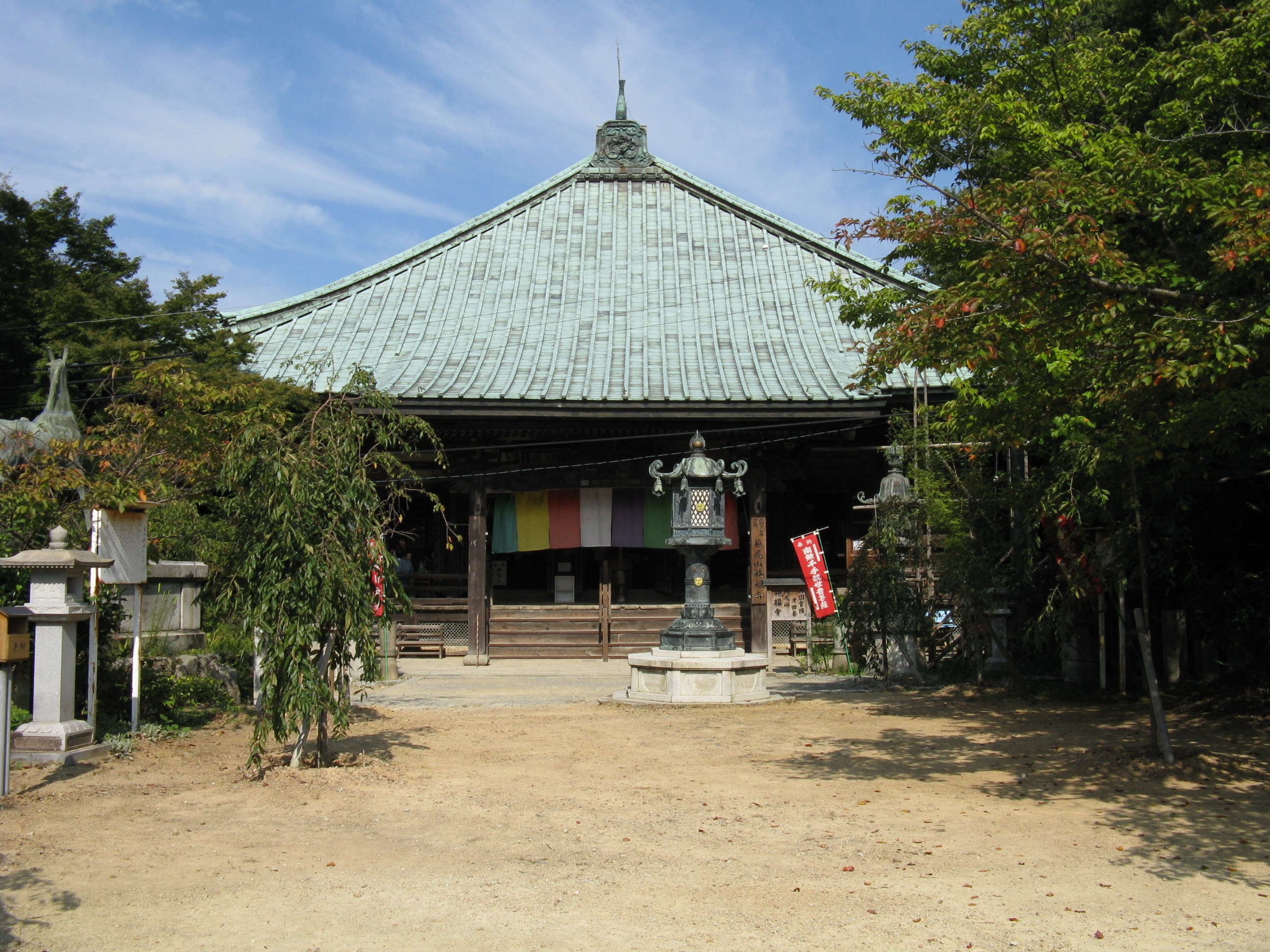 施福寺 本堂